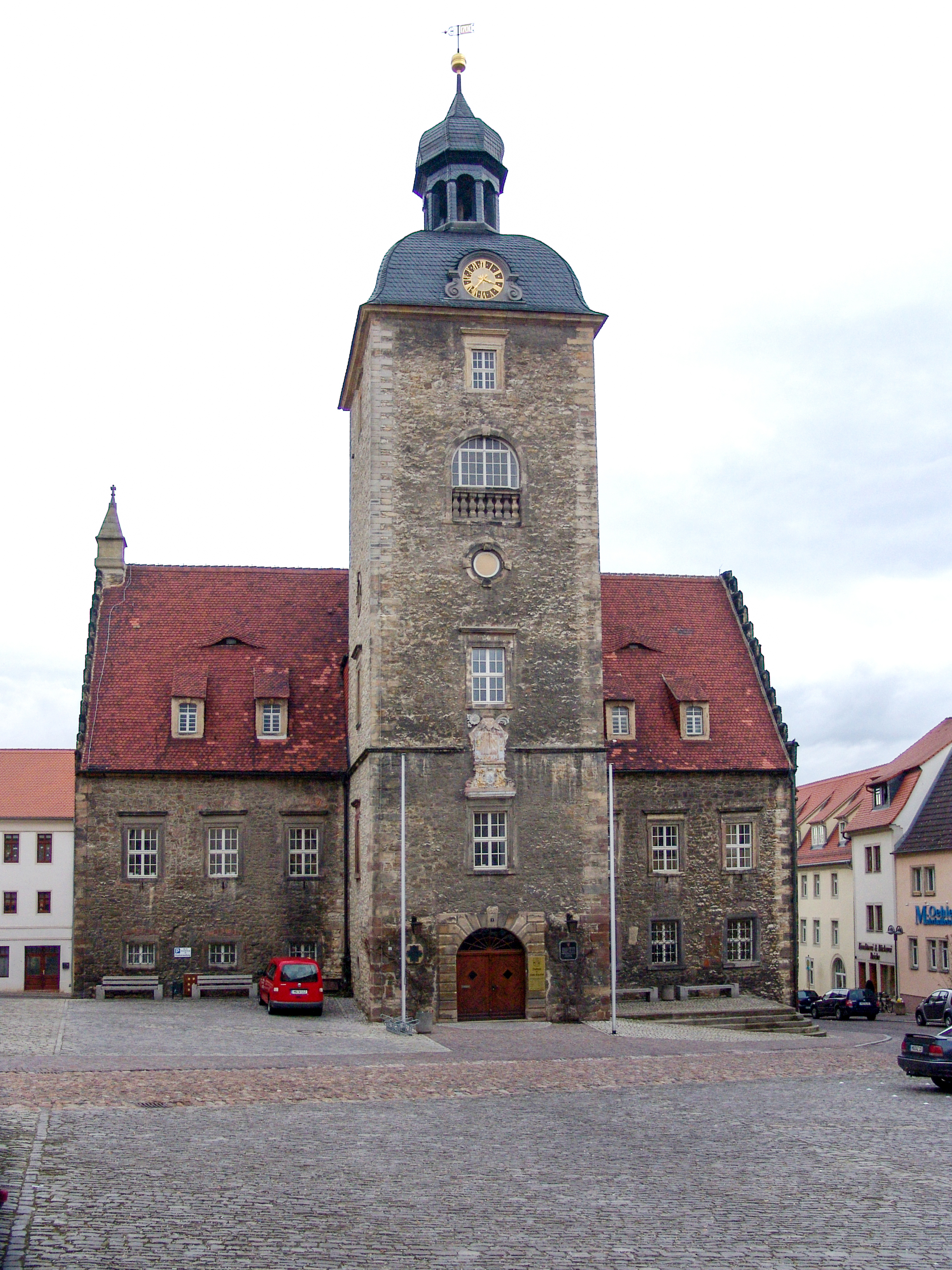 Rathaus Querfurt